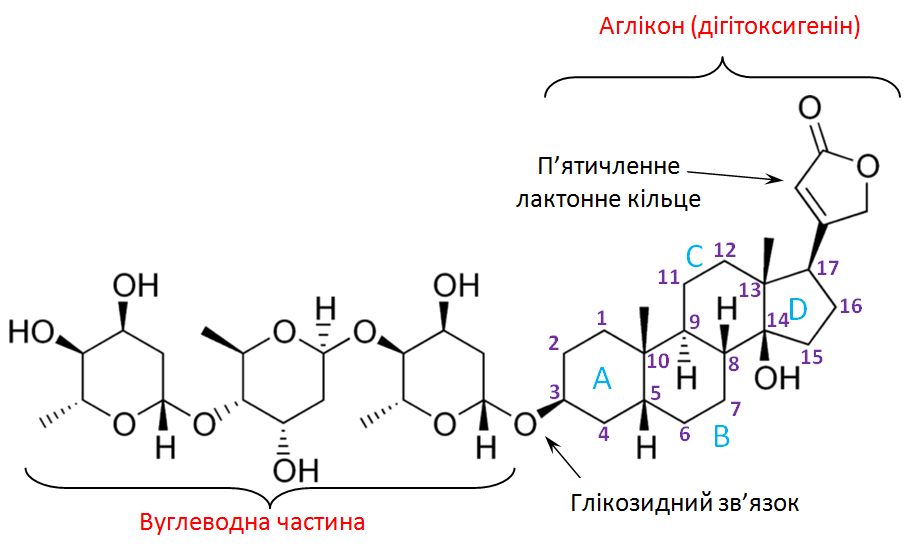 Хімічна будова дігітоксину (серцевого глікозиду), позначені основні частини: гілкон, аглікон, лактонне кільце, атоми у скелеті циклопентанпергідрофенантрену пронумеровані